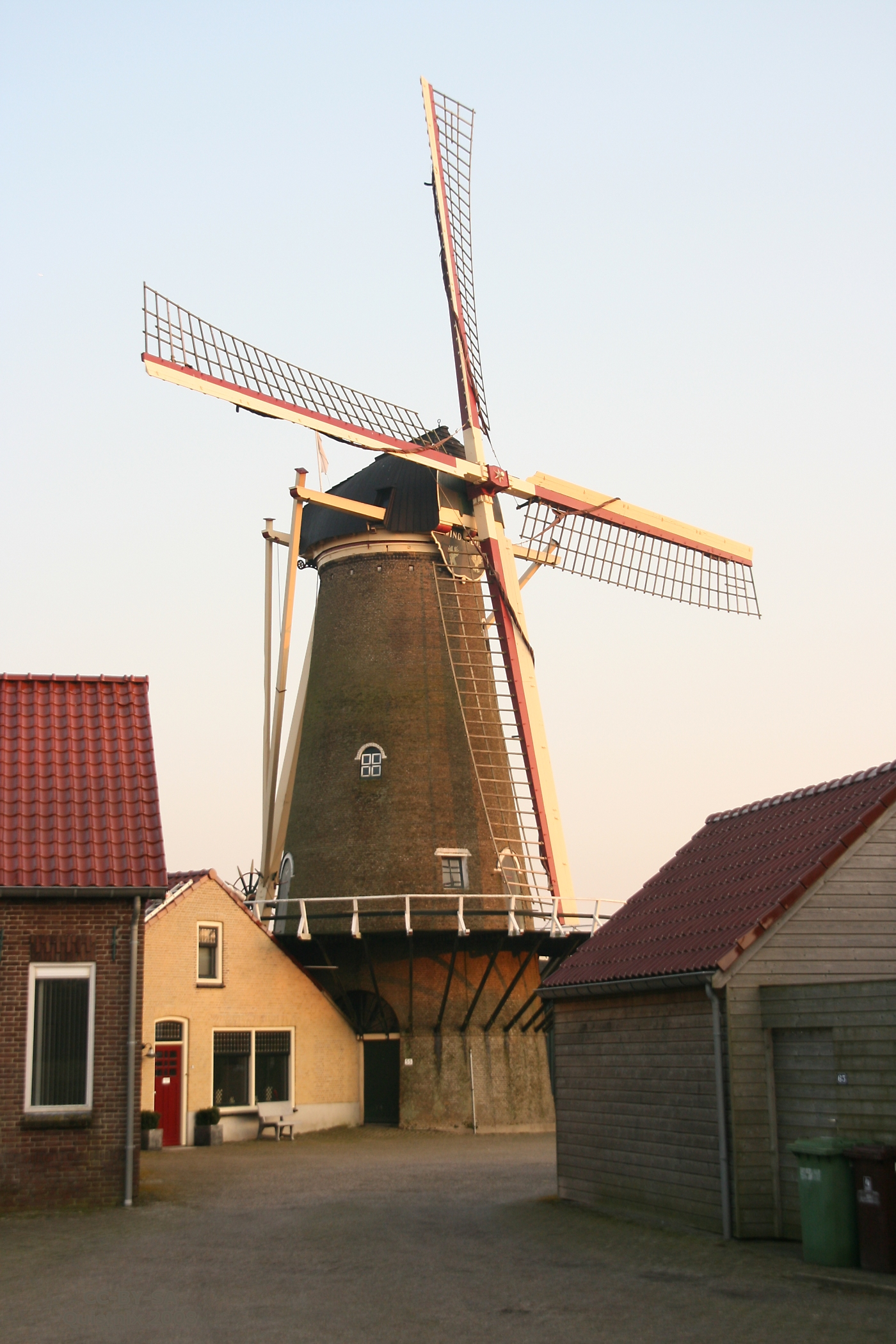 Achthuizen (Oostflakkee), molen Windlust